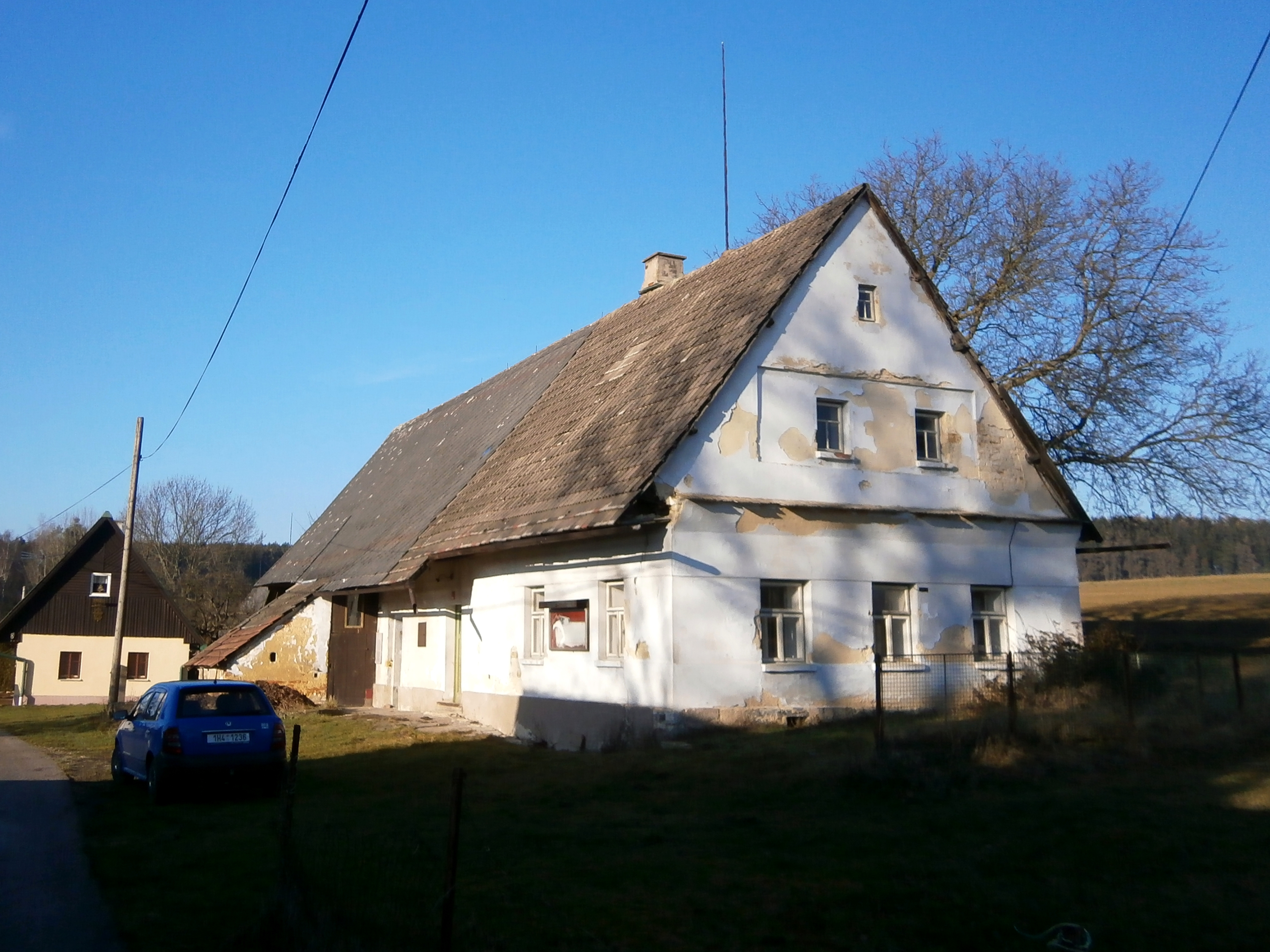 Dům čp. 7